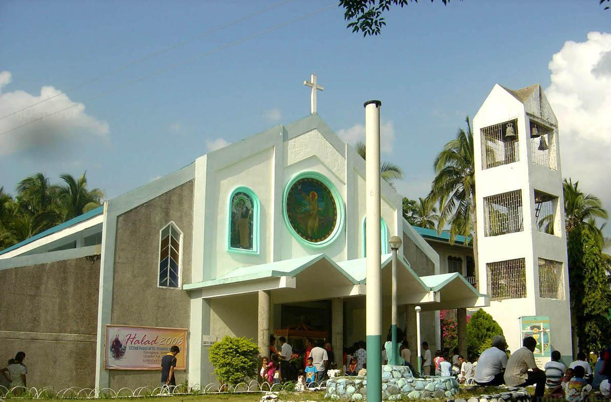 church in Tarangnan, Samar